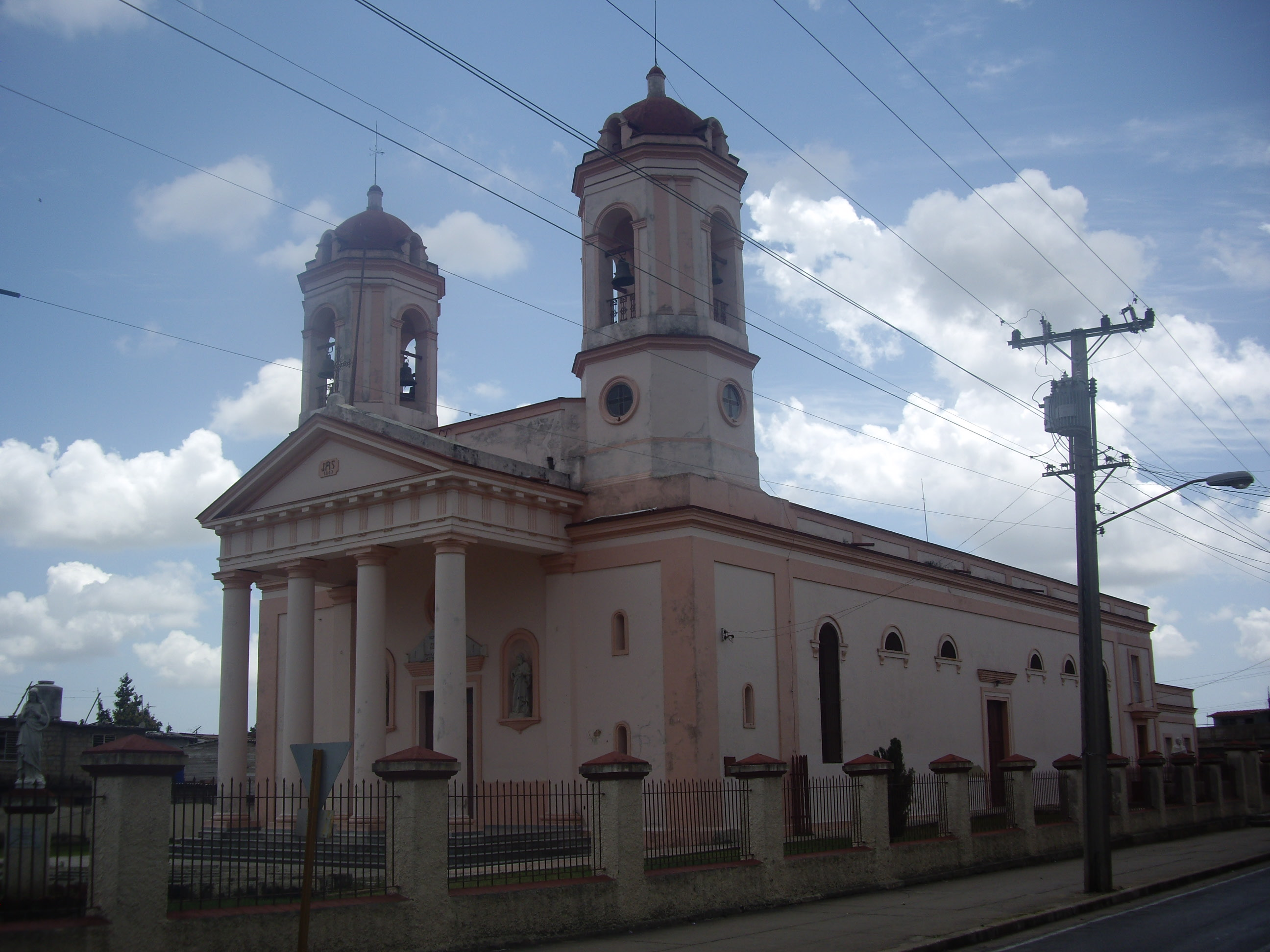 Catedral de San Rosendo a Pinar del Rio